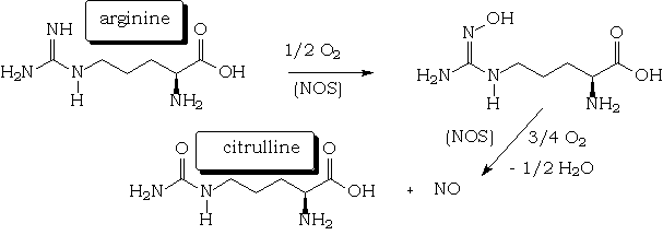 synthèse de NO auteur : Jengi (Chemwindows)